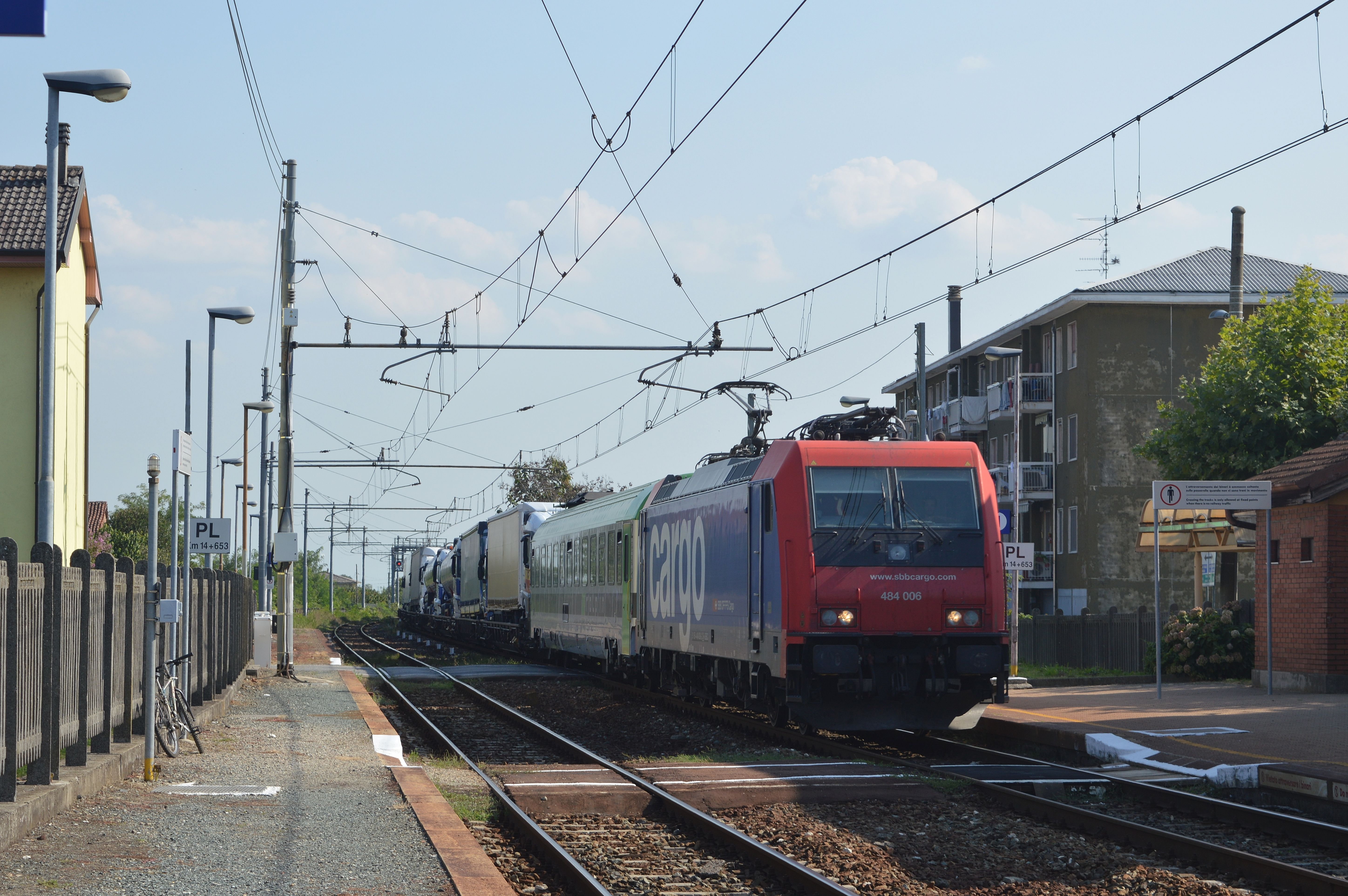 Un treno RoLa in transi nella stazione di Momo